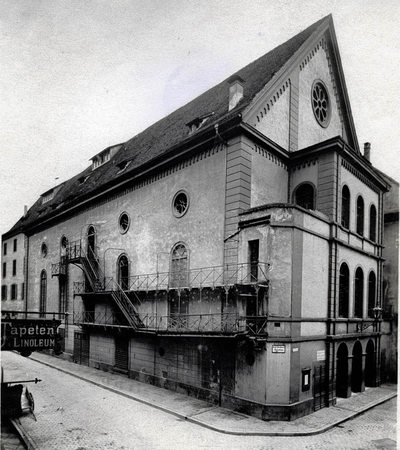 Augustinereremitenkirche als Stadttheater